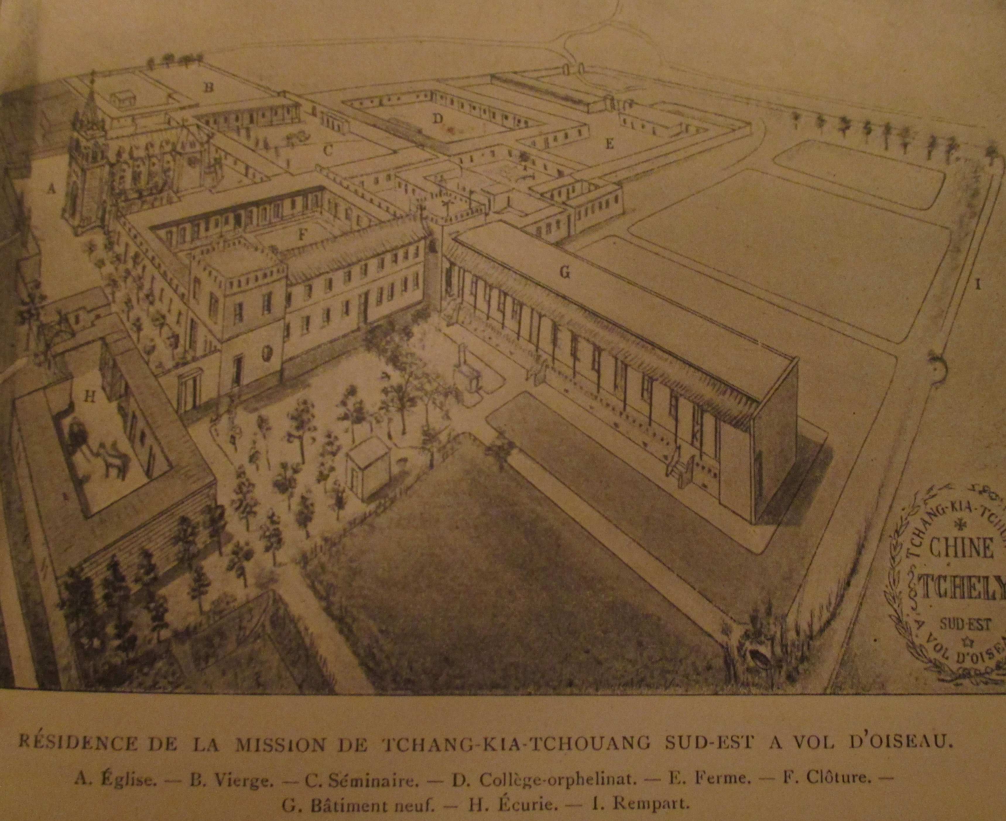 Croquis de la mission jésuite de Tchang-Kia-Tchouang dans le vicariat apostolique du Tché-Ly Sud-Est (Chine) à la fin du XIXe siècle, in R. P. Henry-Joseph Leroy s.j., En Chine au Tché-Ly Sud-Est, éd. Desclée de Brouwer, Bruges, 1900